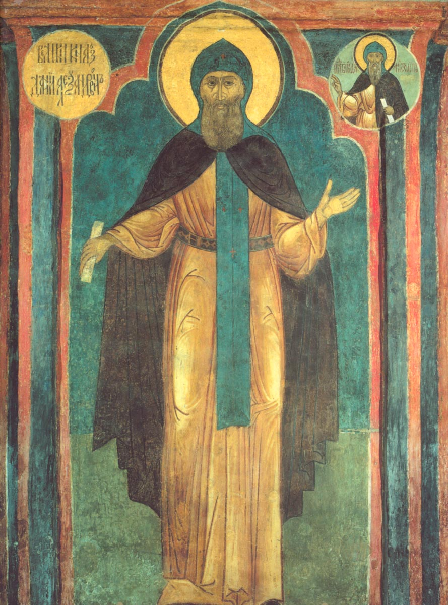 Св. Даниил Московский. Фреска Кремлёвского Архангельского собора Московского Кремля. XVII в.